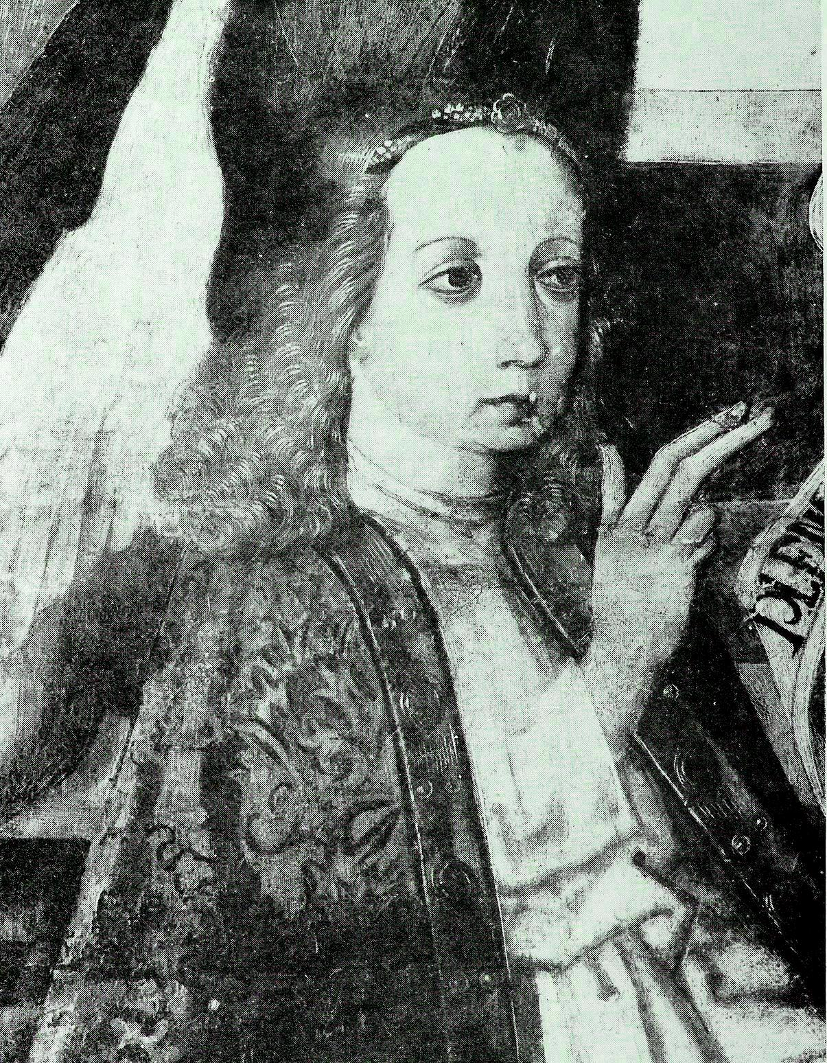 Archanioł Gabriel (fragment "Zwiastowania z Jodłownika"), Mistrz Zwiastowania z Jodłownika (fot. W. Gomuła)